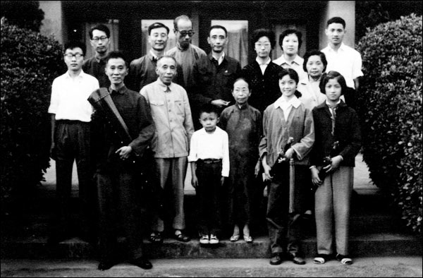 1961年今虞琴社在文藝會堂演出合影